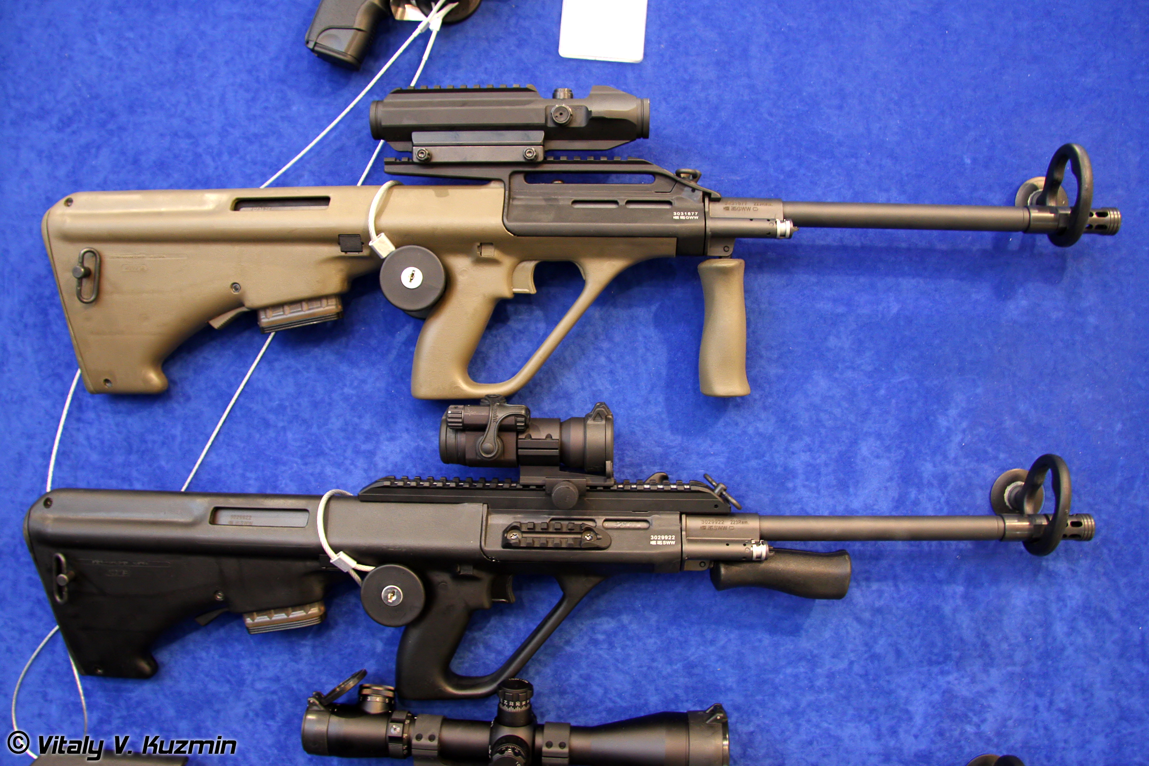 Карабины Mannlicher (Mannlicher carbines)